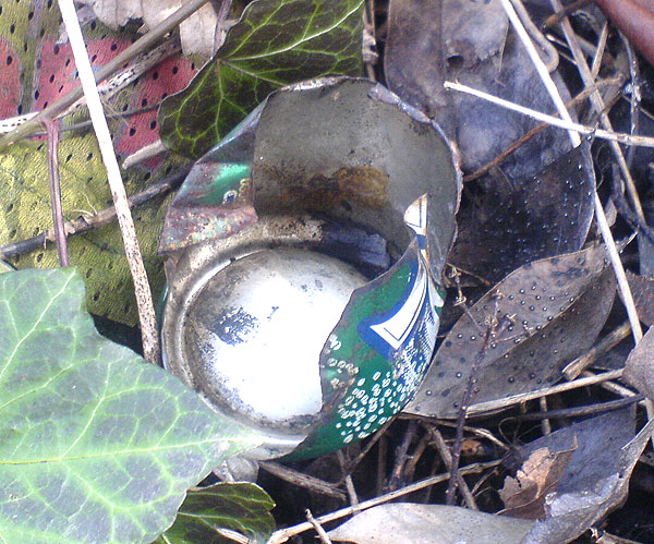 Alte Blechdose, im Suchtdruck zur Heroininhaltation umfunktioniert.